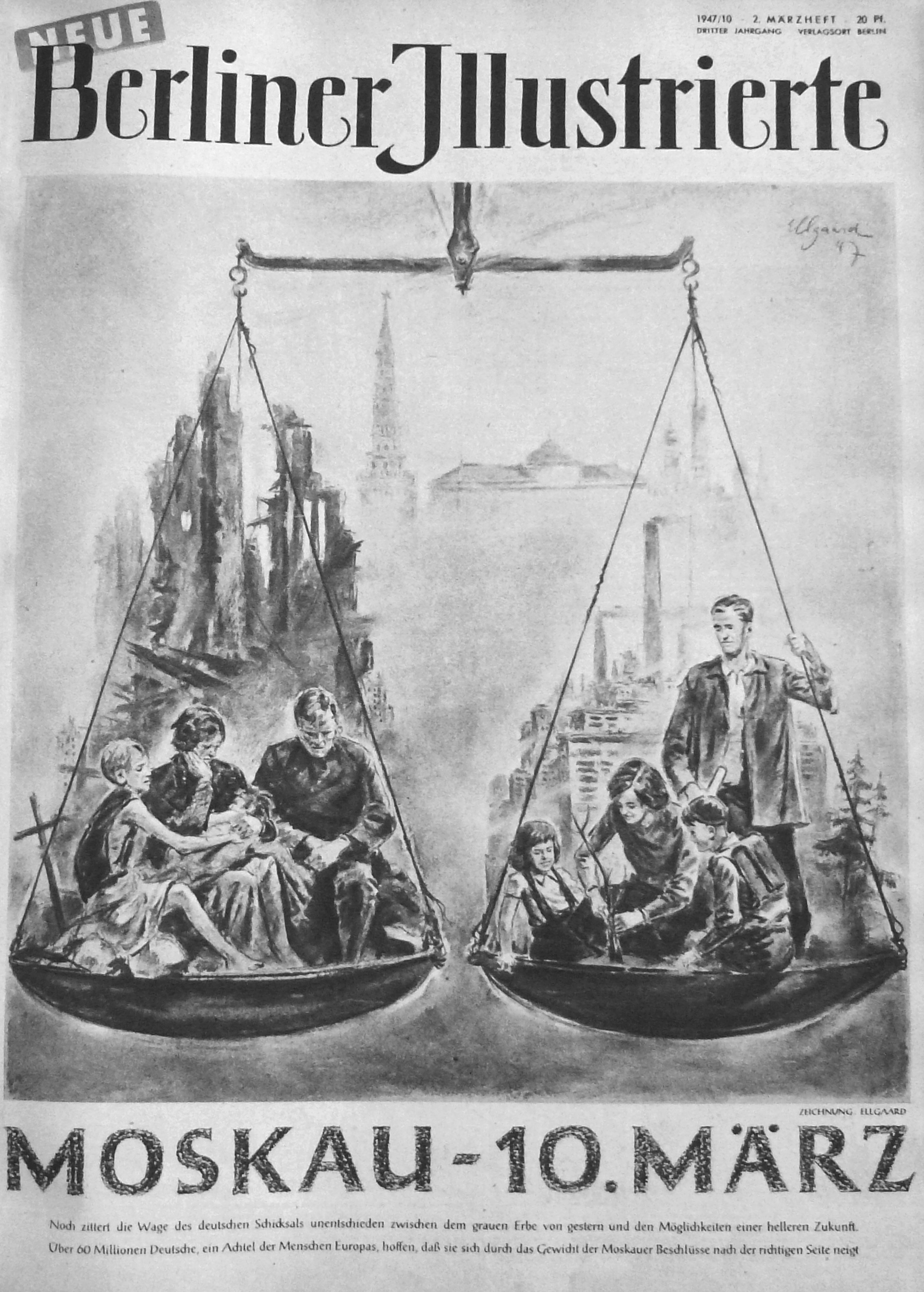 Titelseite der "Neuen Berliner Illustrierten" mit einer Illustration von Helmuth Ellgaard